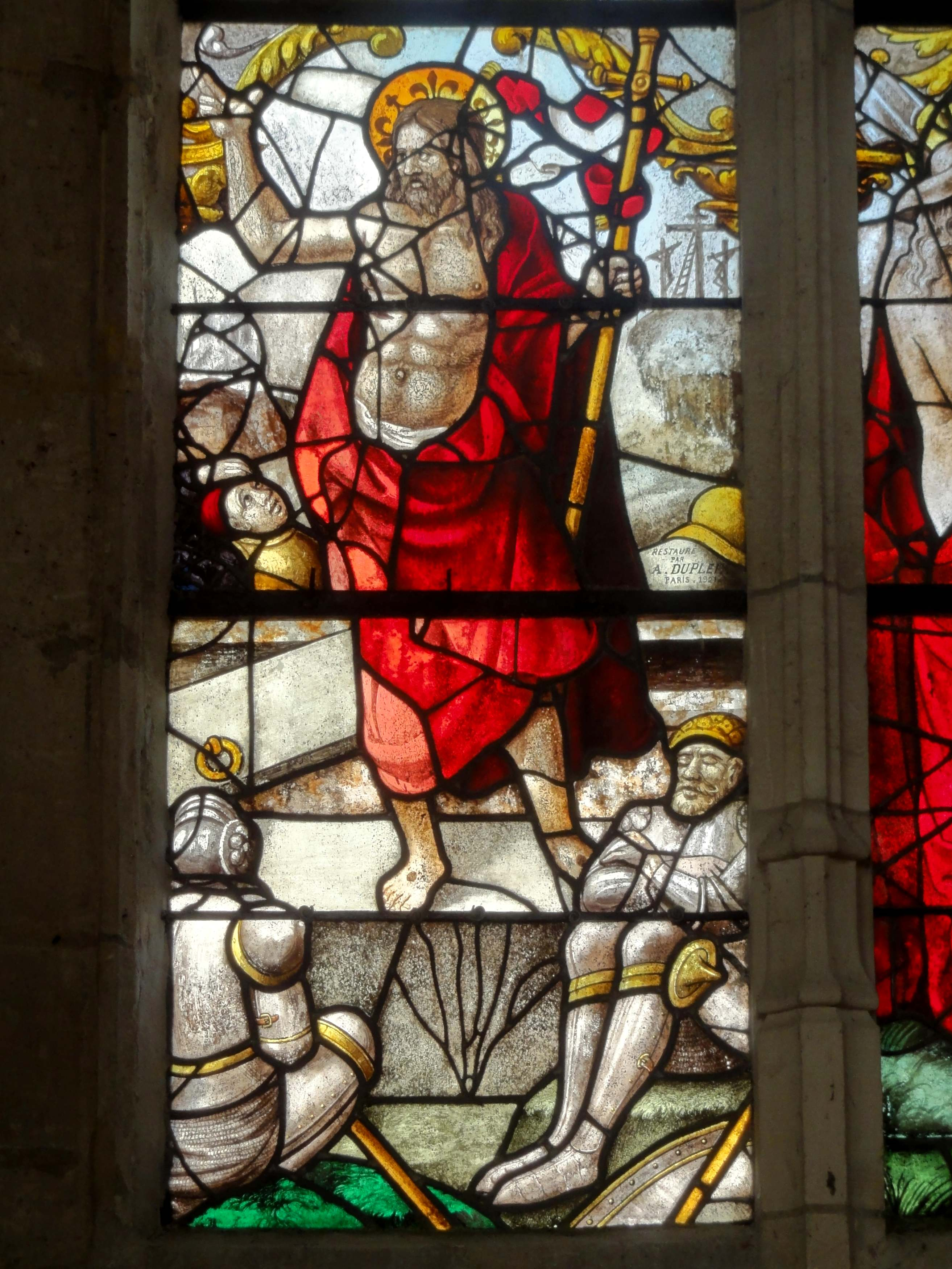 Verrière n° 3 dite de la Résurrection, classée comme verrière n° 5.